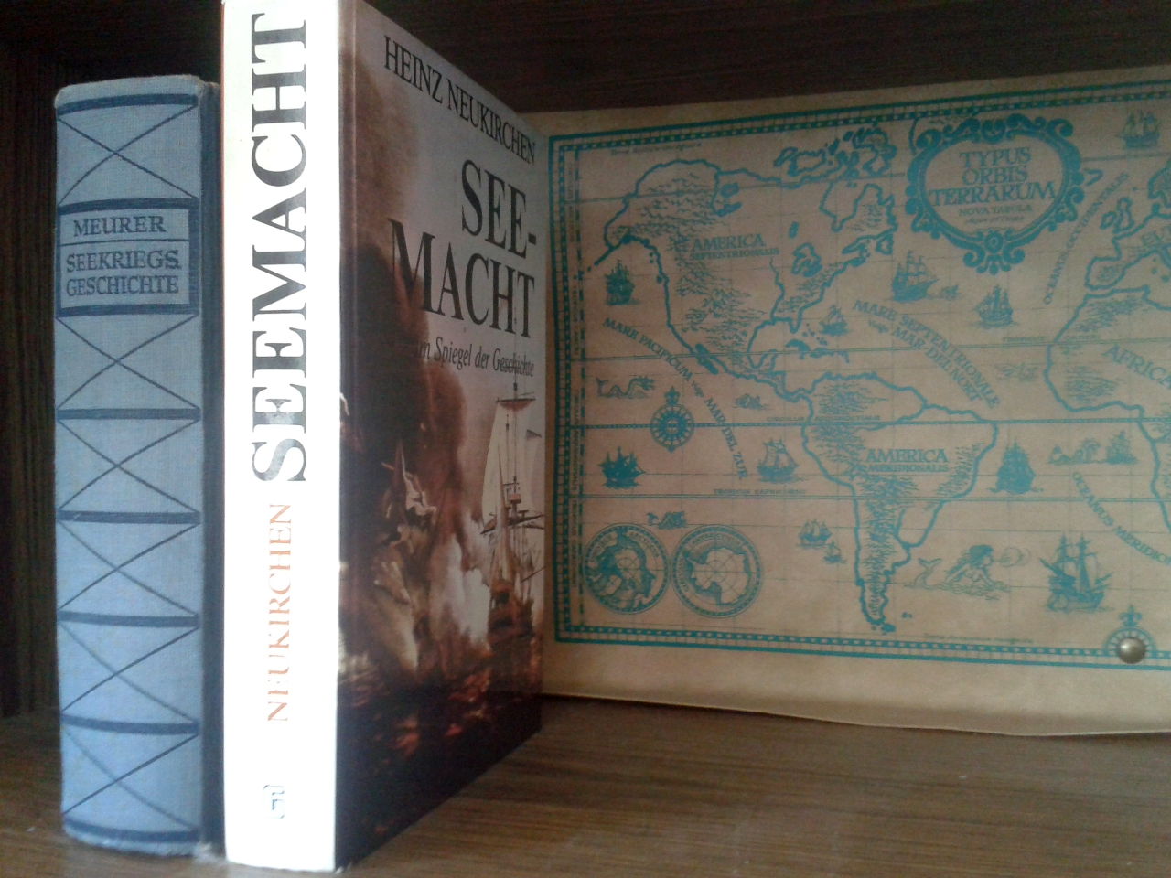 Die Bücher von Vizeadmiral Heinz Neukirchen ("Seemacht im Spiegel der Geschichte") und Vizeadmiral Alexander Meurer ("Seekriegsgeschichte in Umrissen") nebeneinander in einem Bücherregal - inhaltlich ist Neukirchen an Meurer angelehnt.